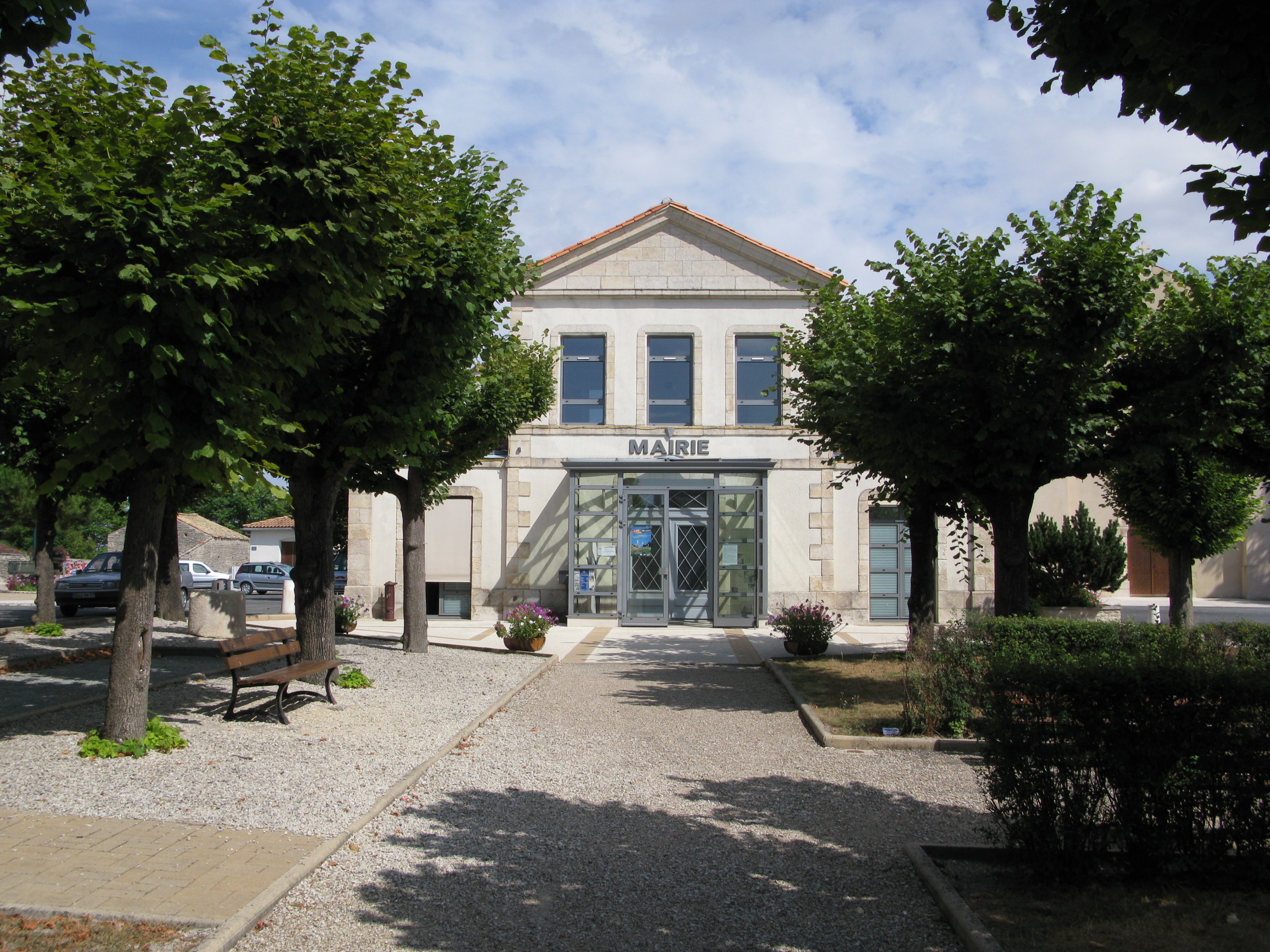 La mairie d'Usseau